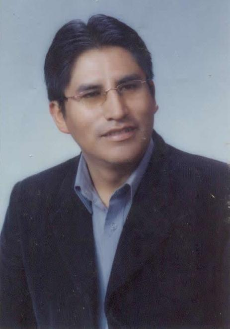 Félix Patzi Depicted person: Félix Patzi – Bolivian politician